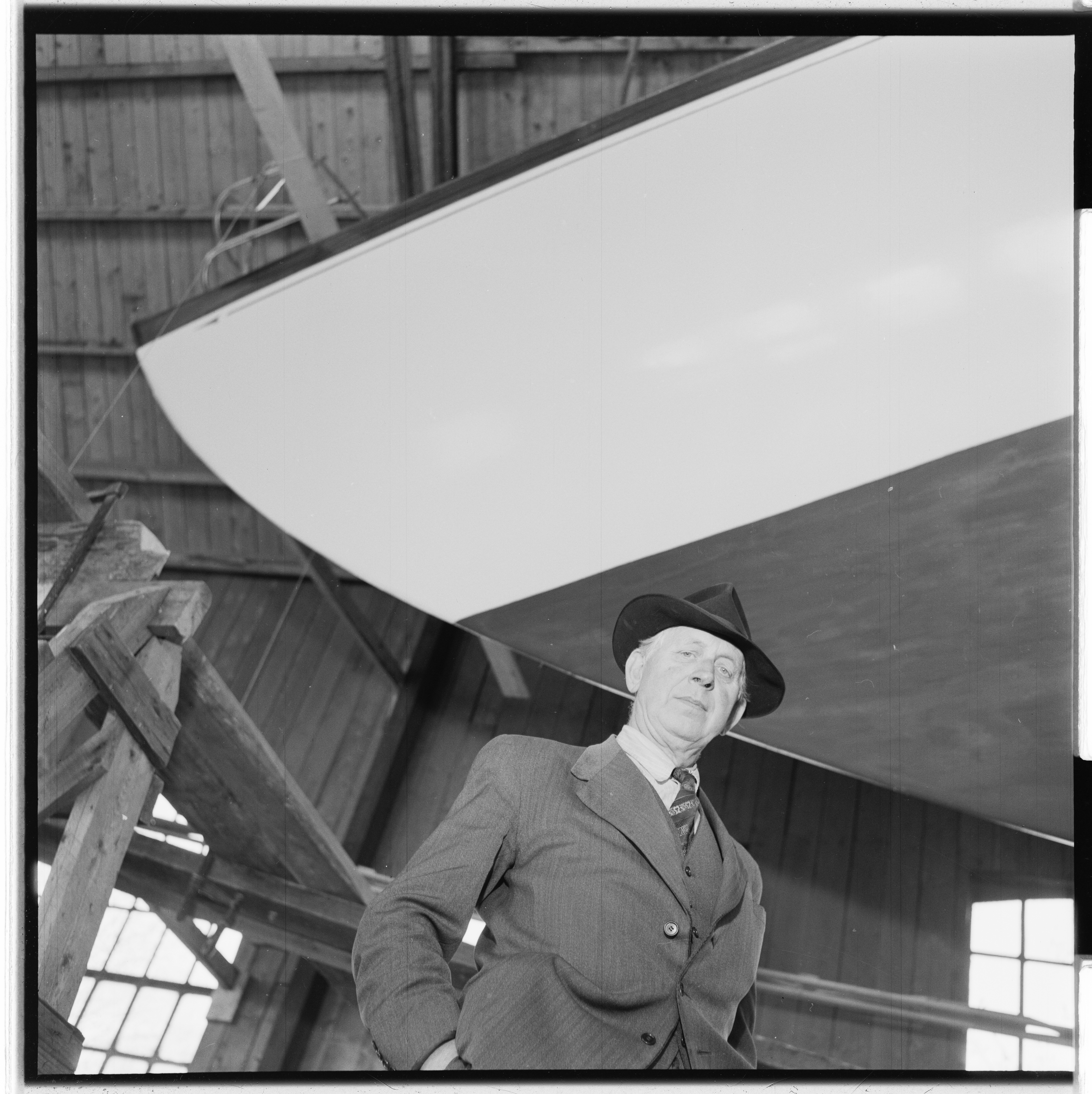 Bildet er hentet fra Arkivverket. Bjarne Aas, båtbygger, Fredrikstad. NÅ nr. 14-15, 1954 Arkivinstitusjon : Riksarkivet Arkivnavn : Billedbladet NÅ Sted : Norge, Østfold, Fredrikstad, Ukjent Emneord: Båtbyggere, Seilbåtkonstruktører, Seilbåter, Menn, Bjarne Aas Avbildet: Aas, Bjarne